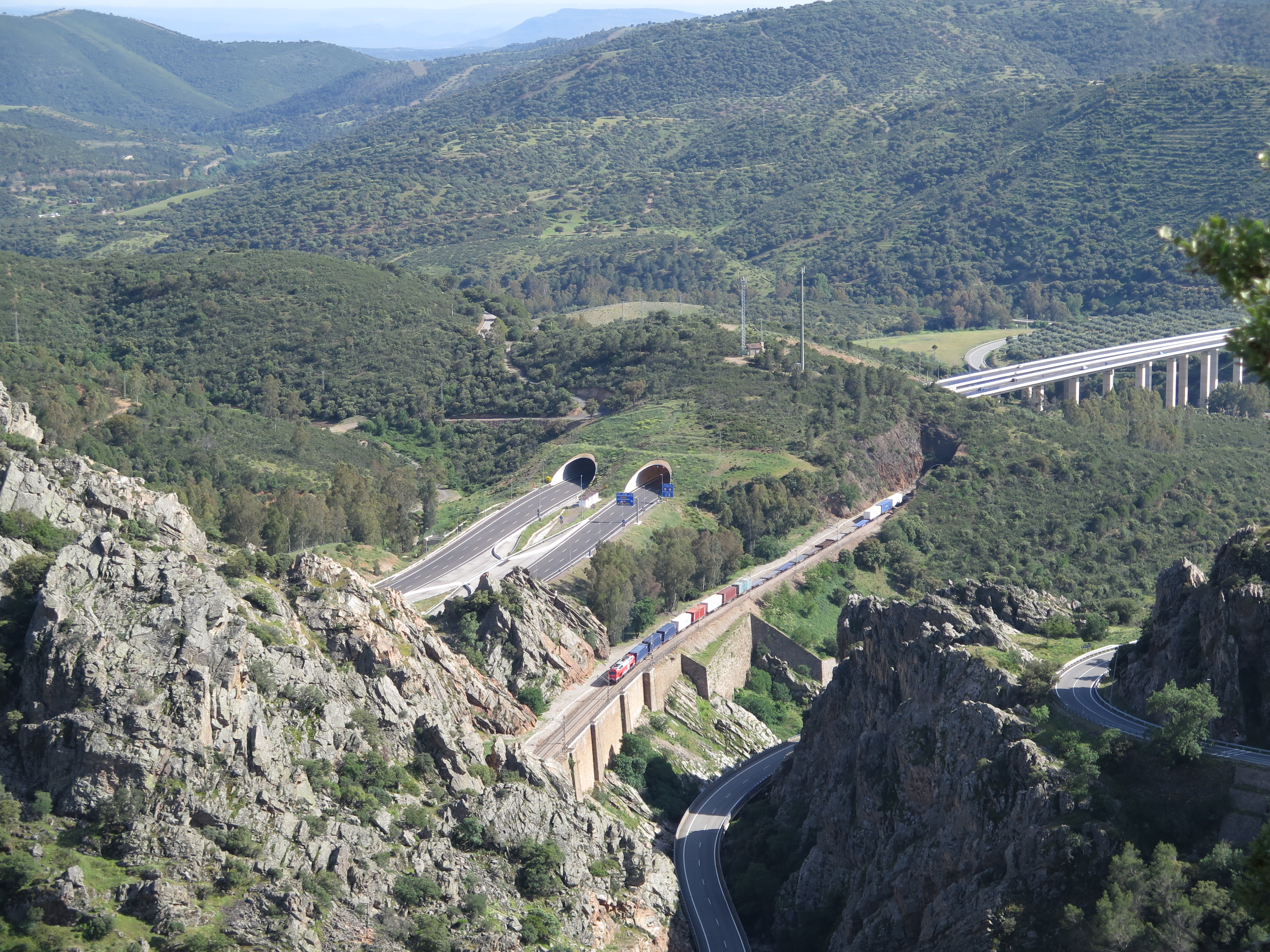 Vista general del Parque Natural de Despeñaperros.